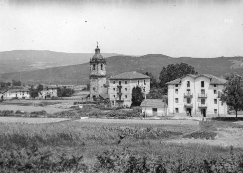 San Miguel. Vista parcial. VOLUMEN Y SOPORTE: 1 fotografía en blanco y negro, negativo en placa de vidrio